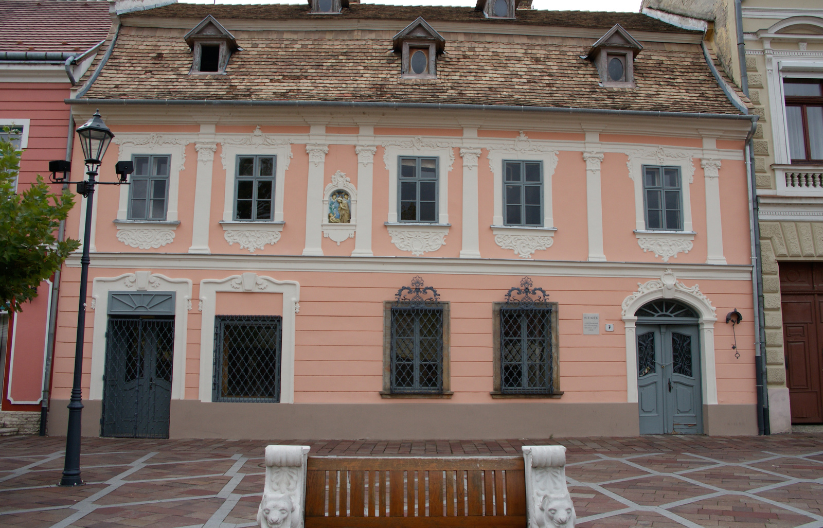 ház (Esztergom, Széchenyi tér 7.)